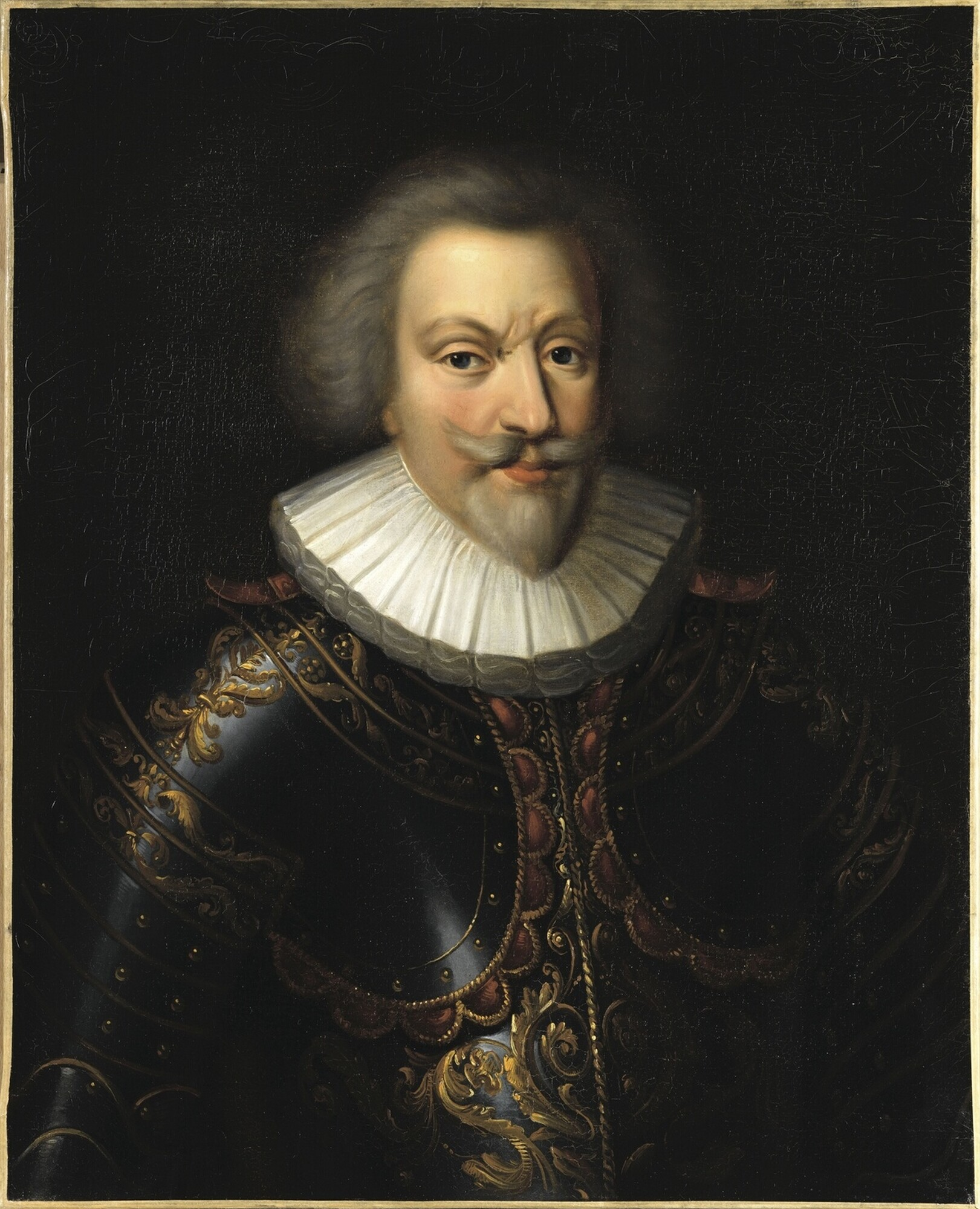 copie d'après un original jadis dans la collection de mademoiselle de Montpensier au château d'Eu ; commandé par Louis-Philippe pour le musée historique de Versailles en 1837